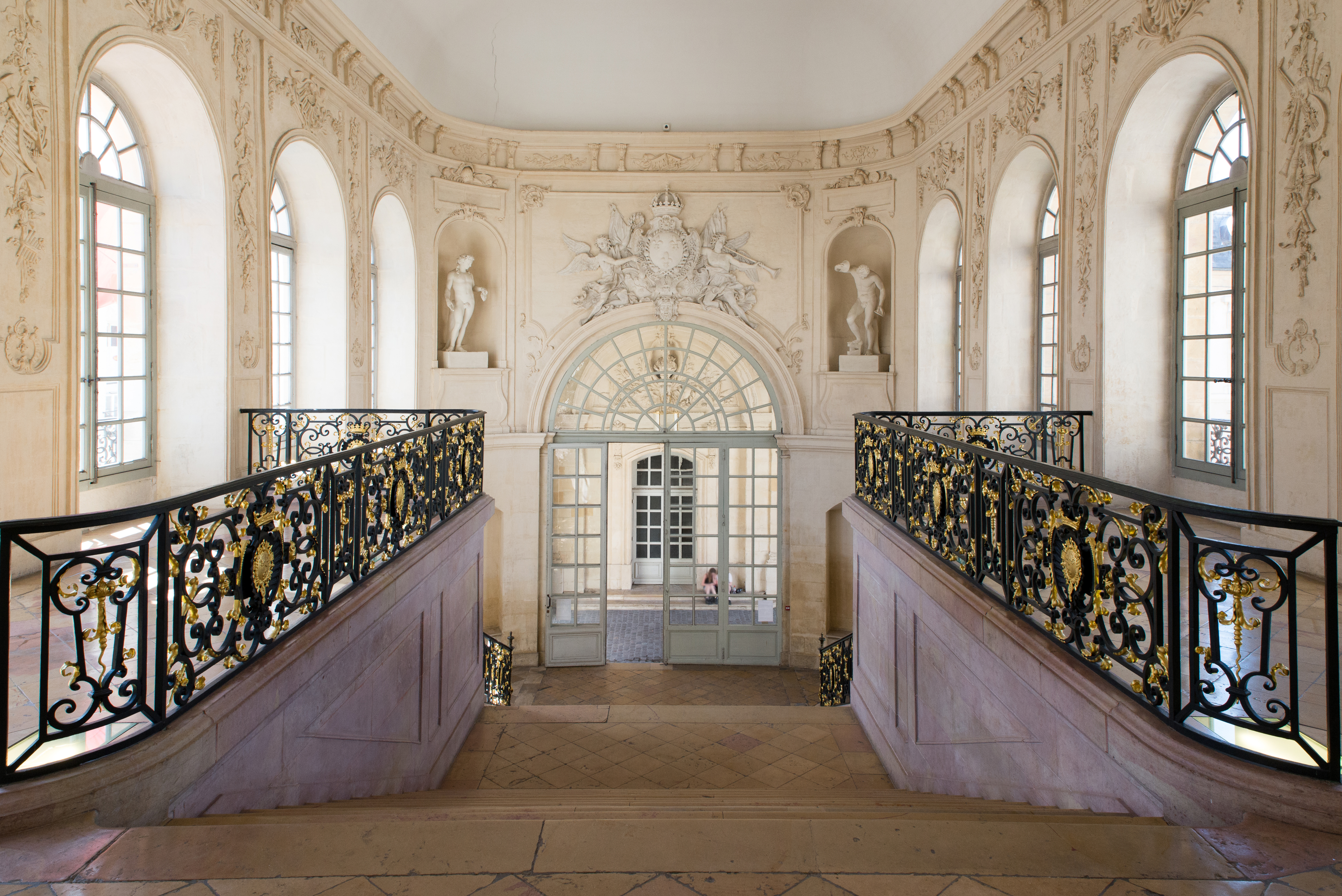 L'escalier Gabriel, vu du haut. Palais des ducs de Dijon (Côte d'Or, France).